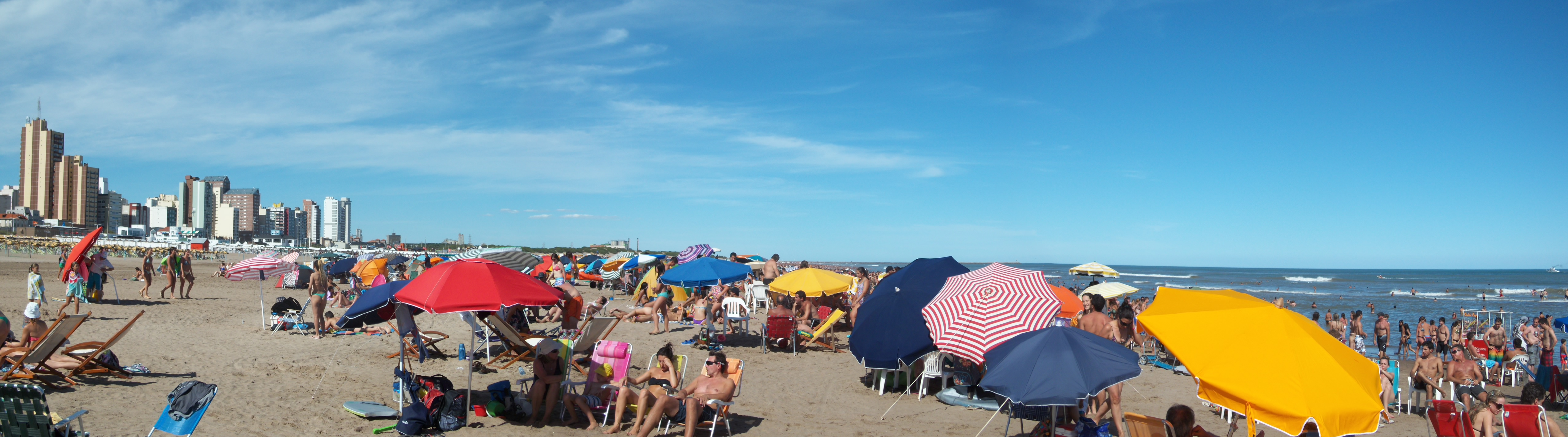 Image from Necochea's beach (Argentina)